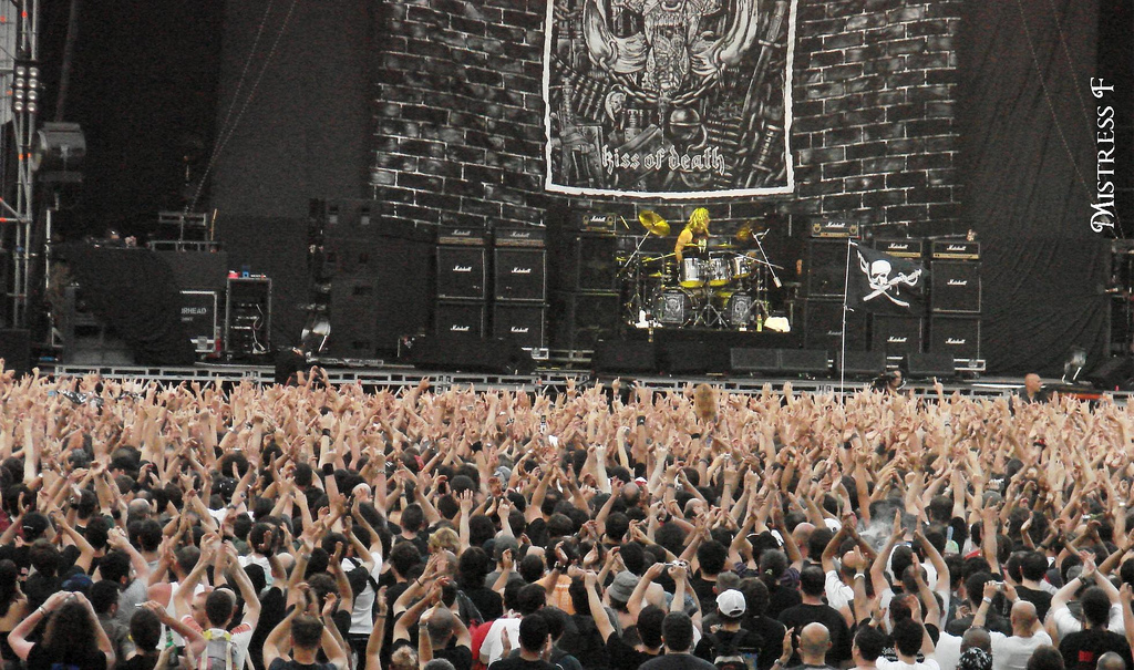 motorhead mikkey dee drum solo june 2007 - olimpic stadium, rome roma stadio olimpico giugno 2007